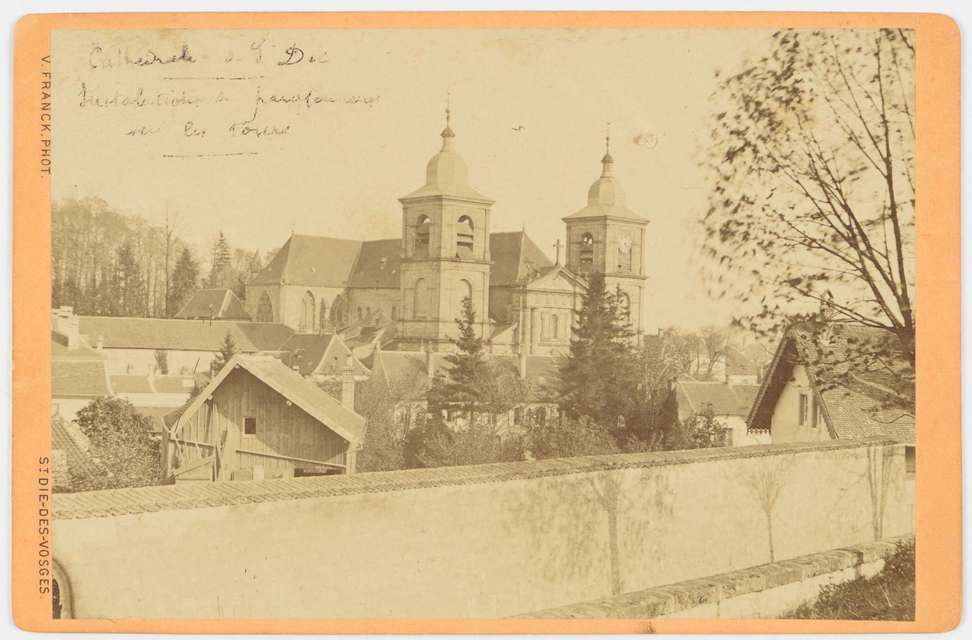 Installation de paratonnerres sur les tours. Photographié par Victor Franck, Saint-Dié. Montage du photographe au verso. Échelle : 10 cm / 1 m. Photographie issue des dossiers de travaux de restauration des cathédrales (1802-1912), conservés aux Archives nationales (inventaire et documents numérisés consultables en ligne).